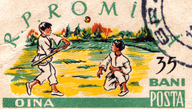 Source: Post of Romania